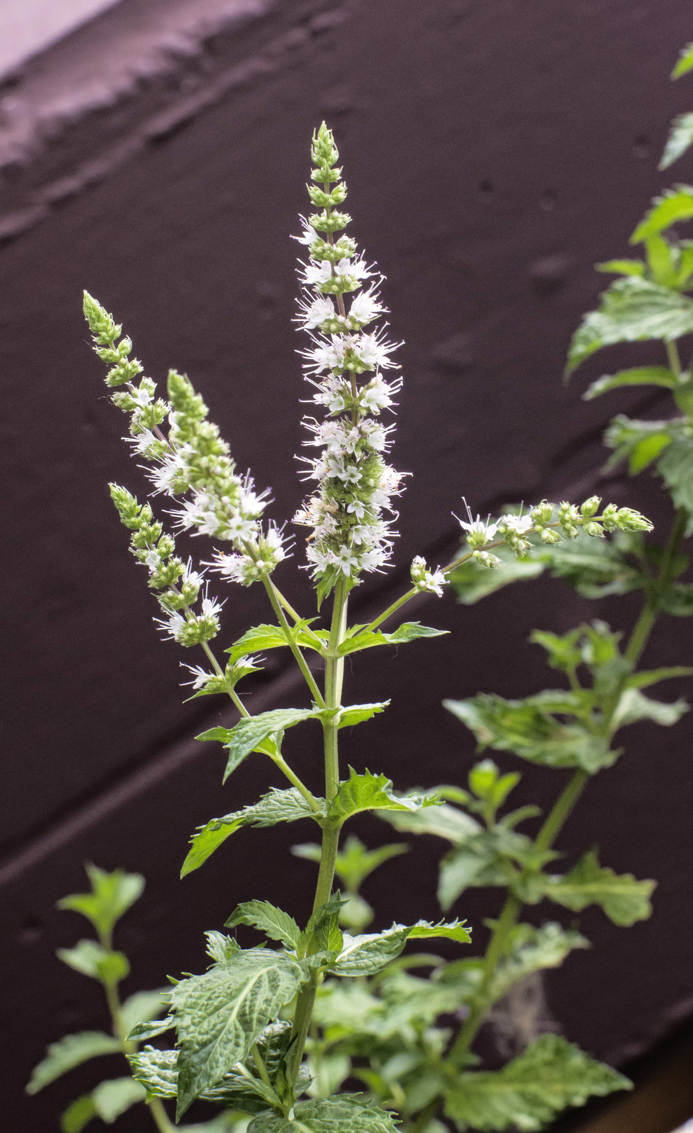 Pfefferminzblüten.